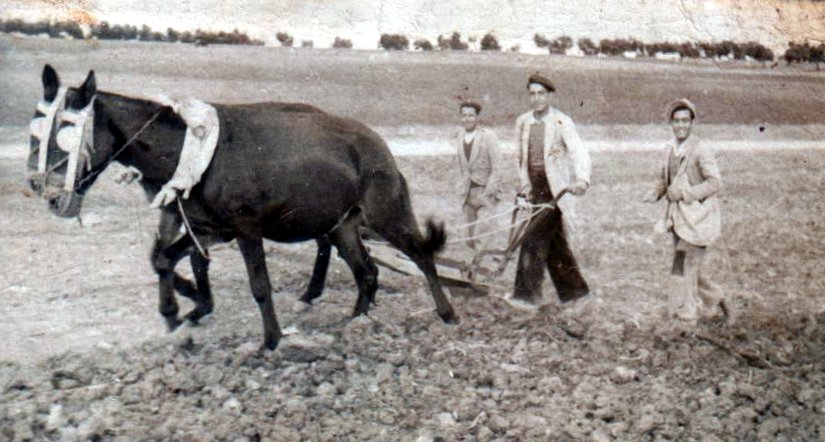 Cristobal García, arando en lo alto del Camino Majadahonda, año 1950